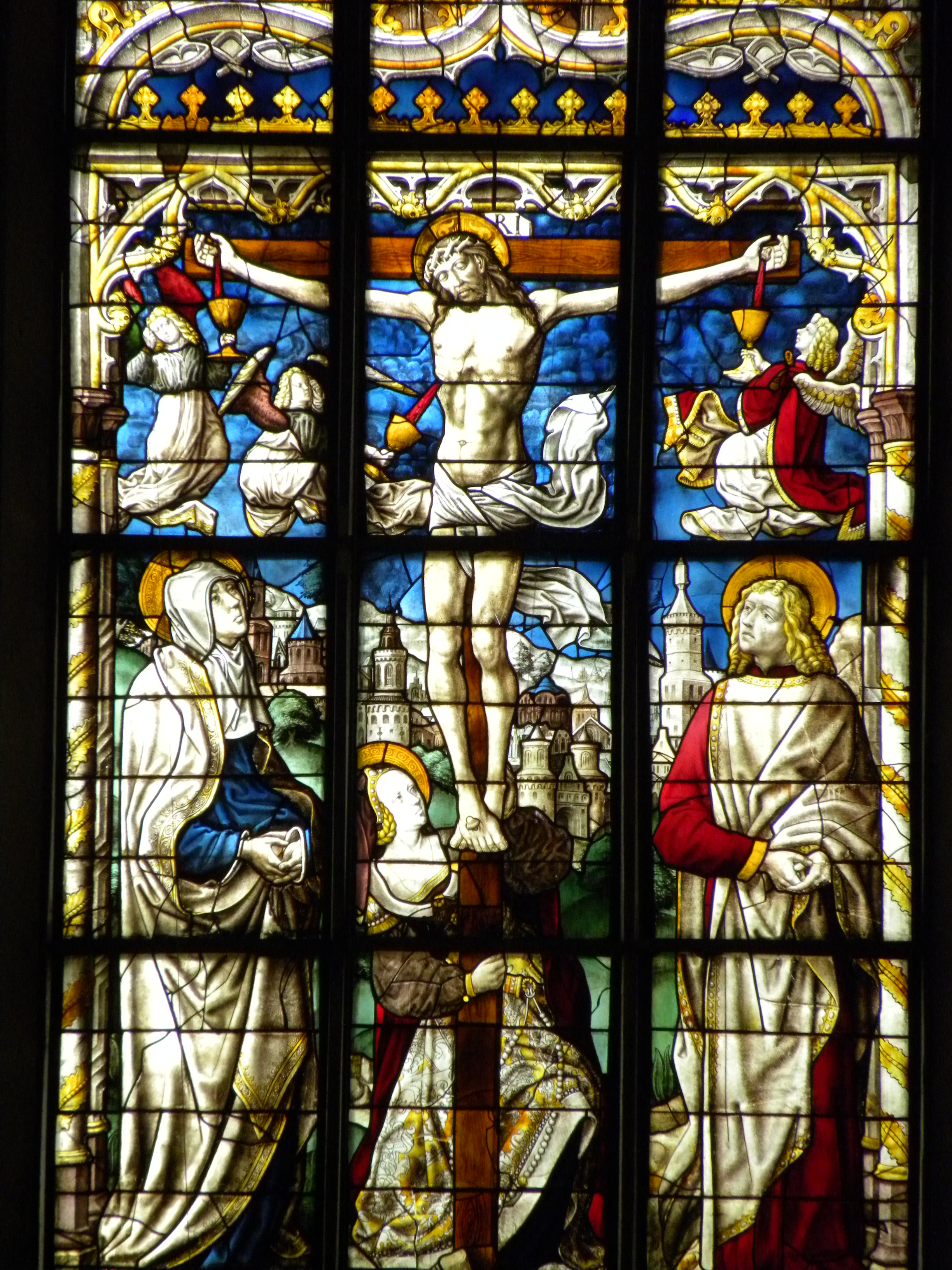 St. Matthias bei Trier Kreuzfenster, Wilhelm von der Eifel, Anfang16. JH.